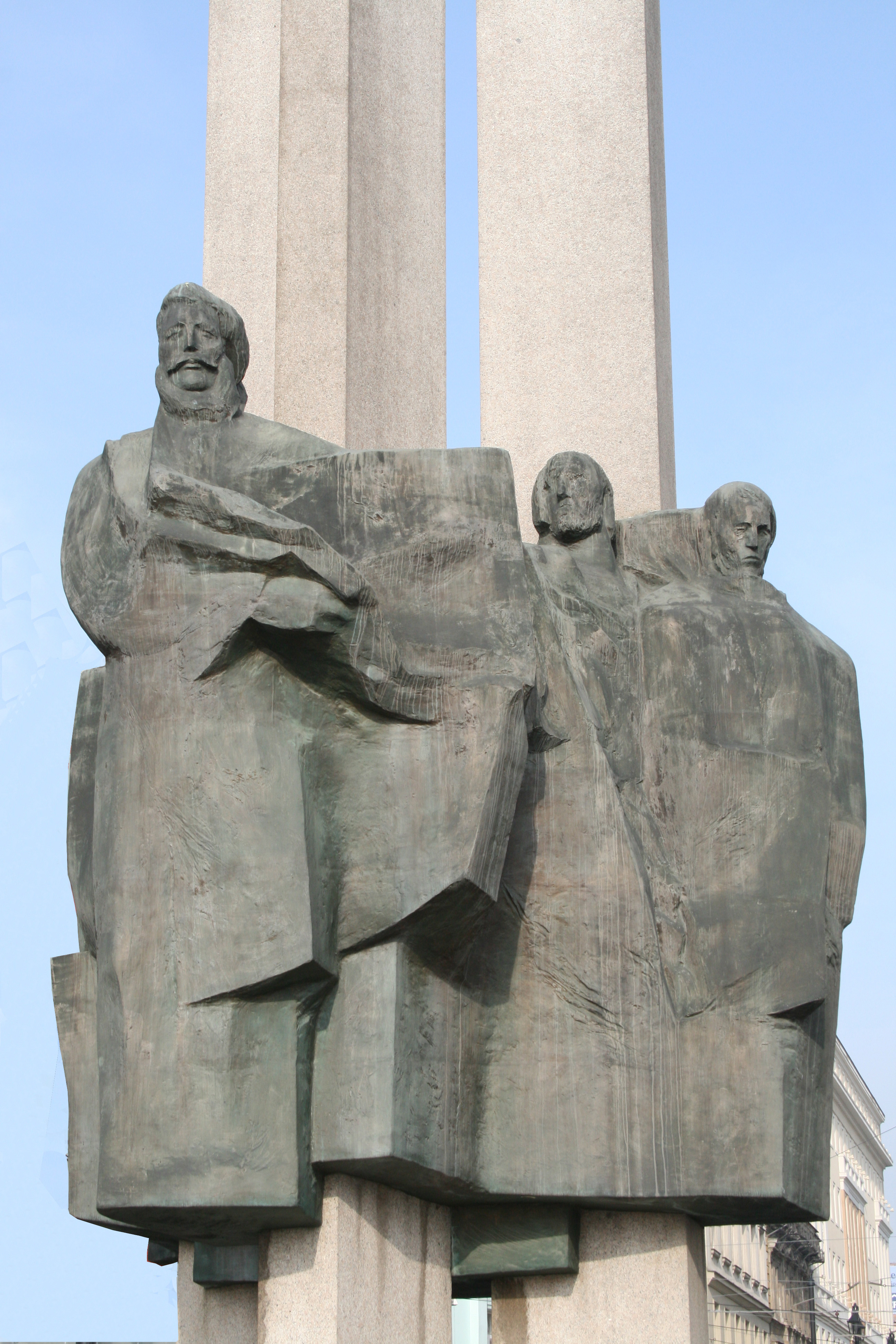 Bratislava, Bartfay Tibor: plastika Ľudovíta Štúra. Autorom pamätníka je taktiež Ivan Salai, 1973. Monumentálny pomník s ústrednou postavou Ľudovíta Štúra na Námestí Ľ. Štúra.